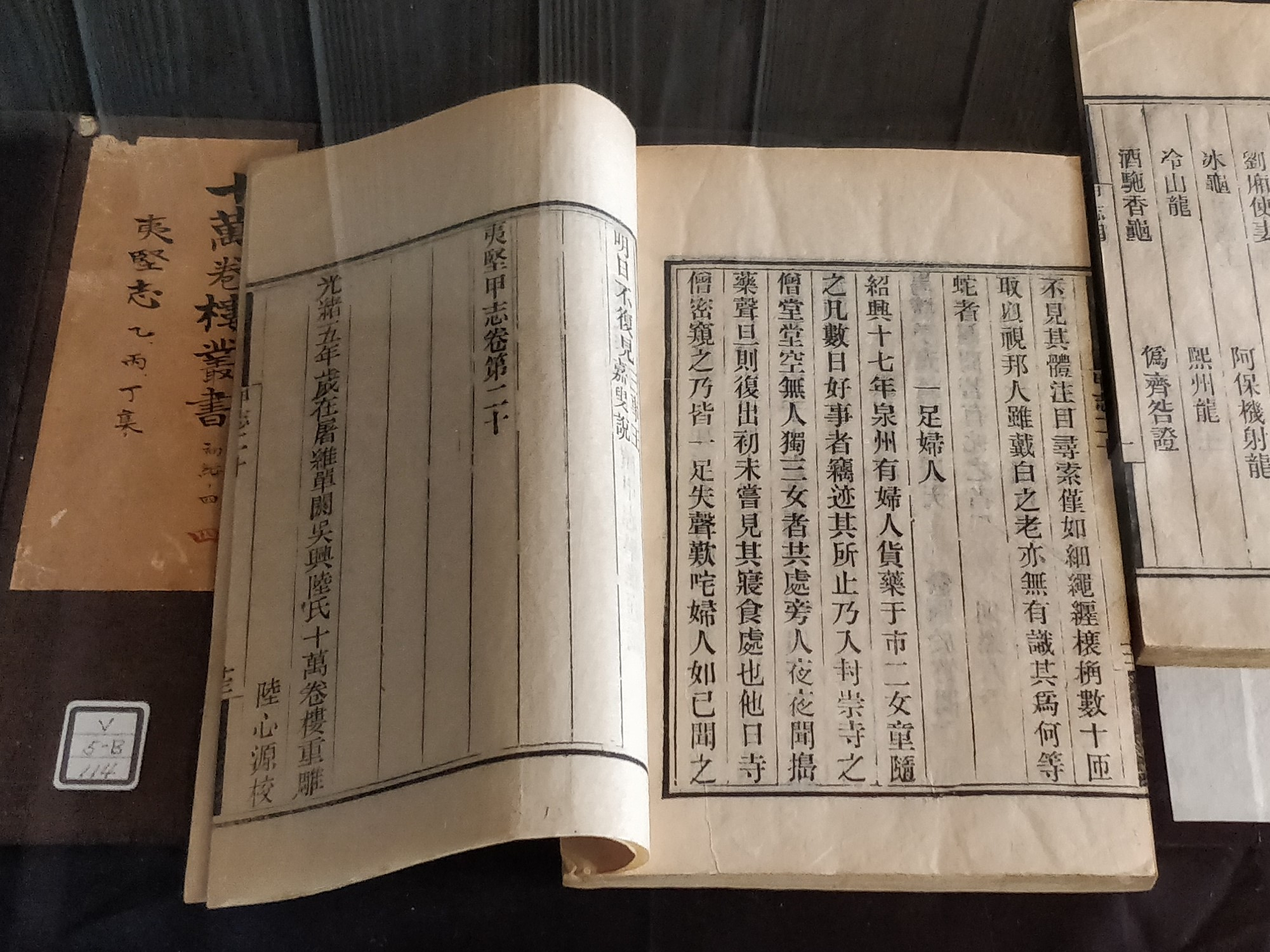 《十萬卷樓叢書》本 夷堅志, 東京東洋文庫藏